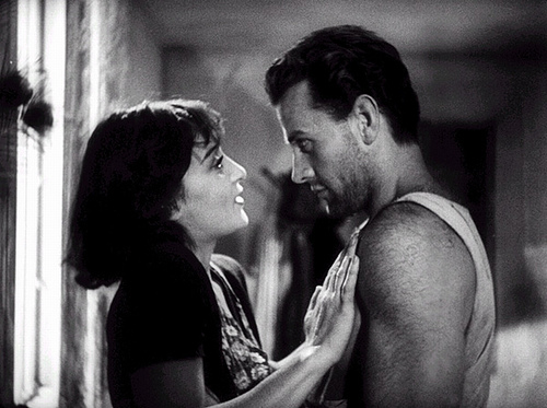 Clara Calamai e Massimo Girotti numa sequência do filme Ossessione de Luchino Visconti (1943)